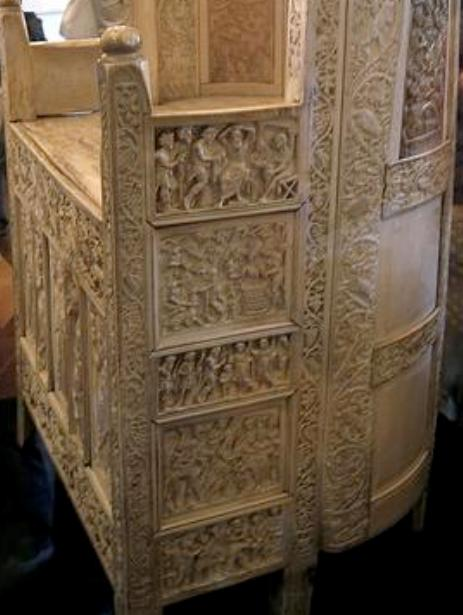 catedra